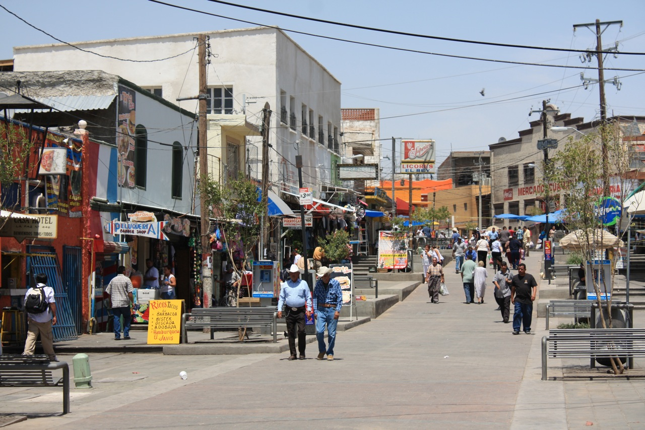 Ciudad Juárez, México